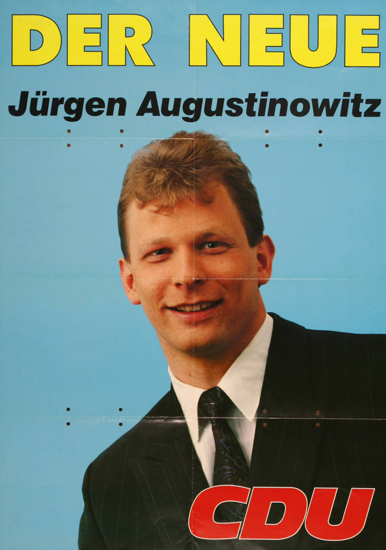 Der Neue Jürgen Augustinowitz CDU Abbildung: Porträtfoto Plakatart: Kandidaten-/Personenplakat mit Porträt Objekt-Signatur: 10-001 : 3559 Bestand: Plakate zu Bundestagswahlen (10-001) GliederungBestand10-18: Plakate zu Bundestagswahlen (10-001) » Die 12. Bundestagswahl am 2. Dezember 1990 » CDU » Mit Porträtfoto Lizenz: KAS/ACDP 10-001 : 3559 CC-BY-SA 3.0 DE